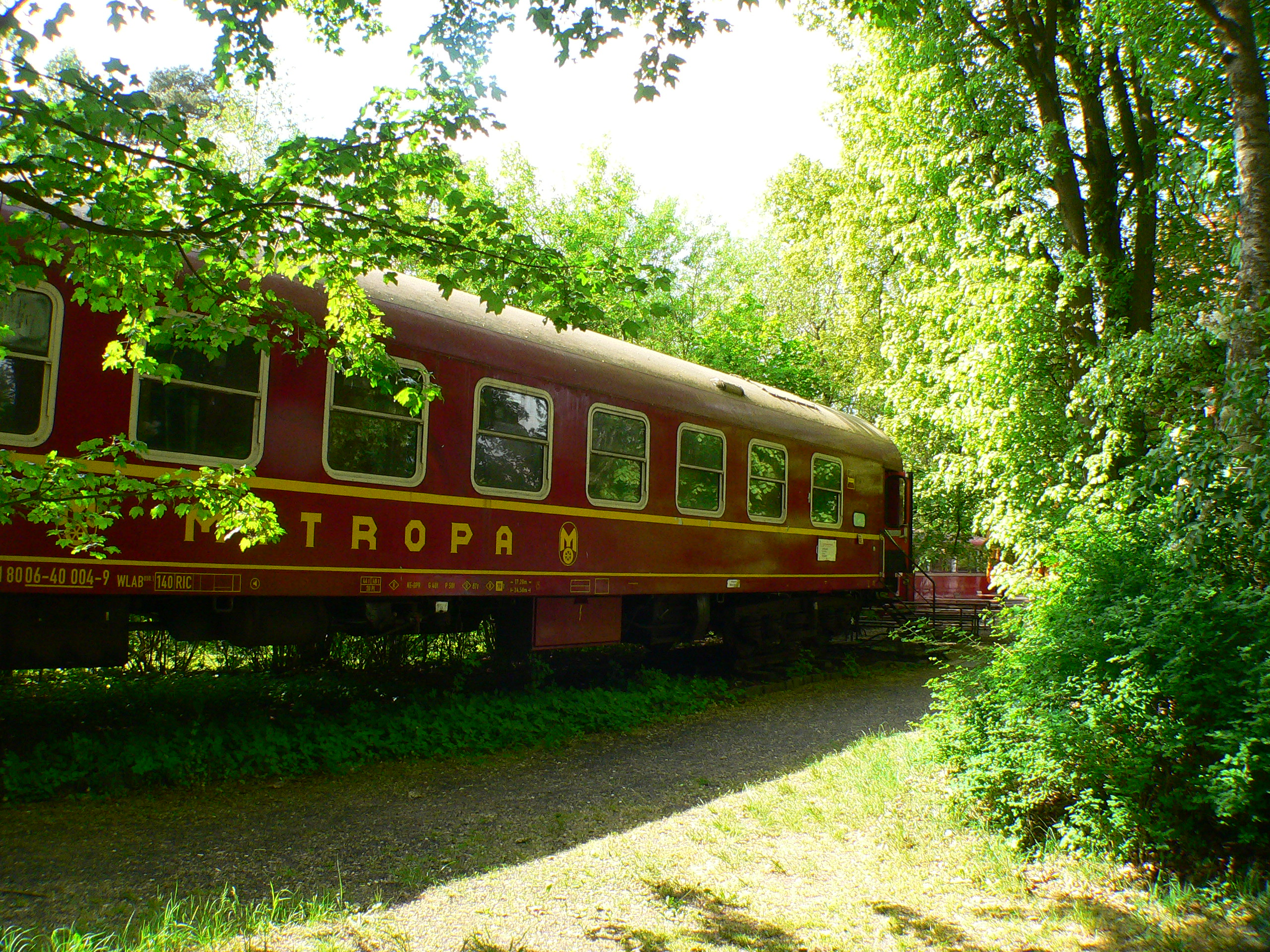 Wohratalbahn - Mitropa-Schlafwagen am ehem. Bahnhof Gemünden (Wohra).